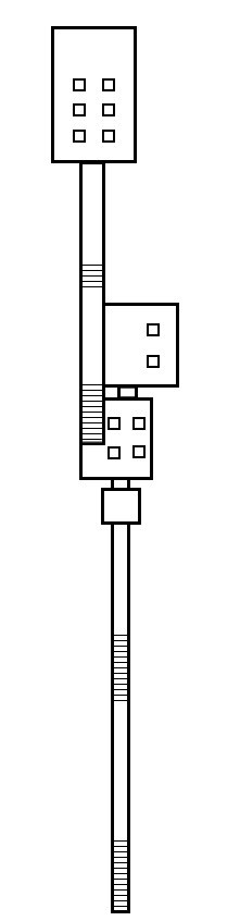 Esquema d'una tomba estàndard amb eix paral·lel, Vall dels Reis.